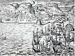 Ataque de la flota y tropas del almirante holandés Pieter van Der Does a Las Palmas de Gran Canaria (1599). Grabado neerlandes, siglo XVII.